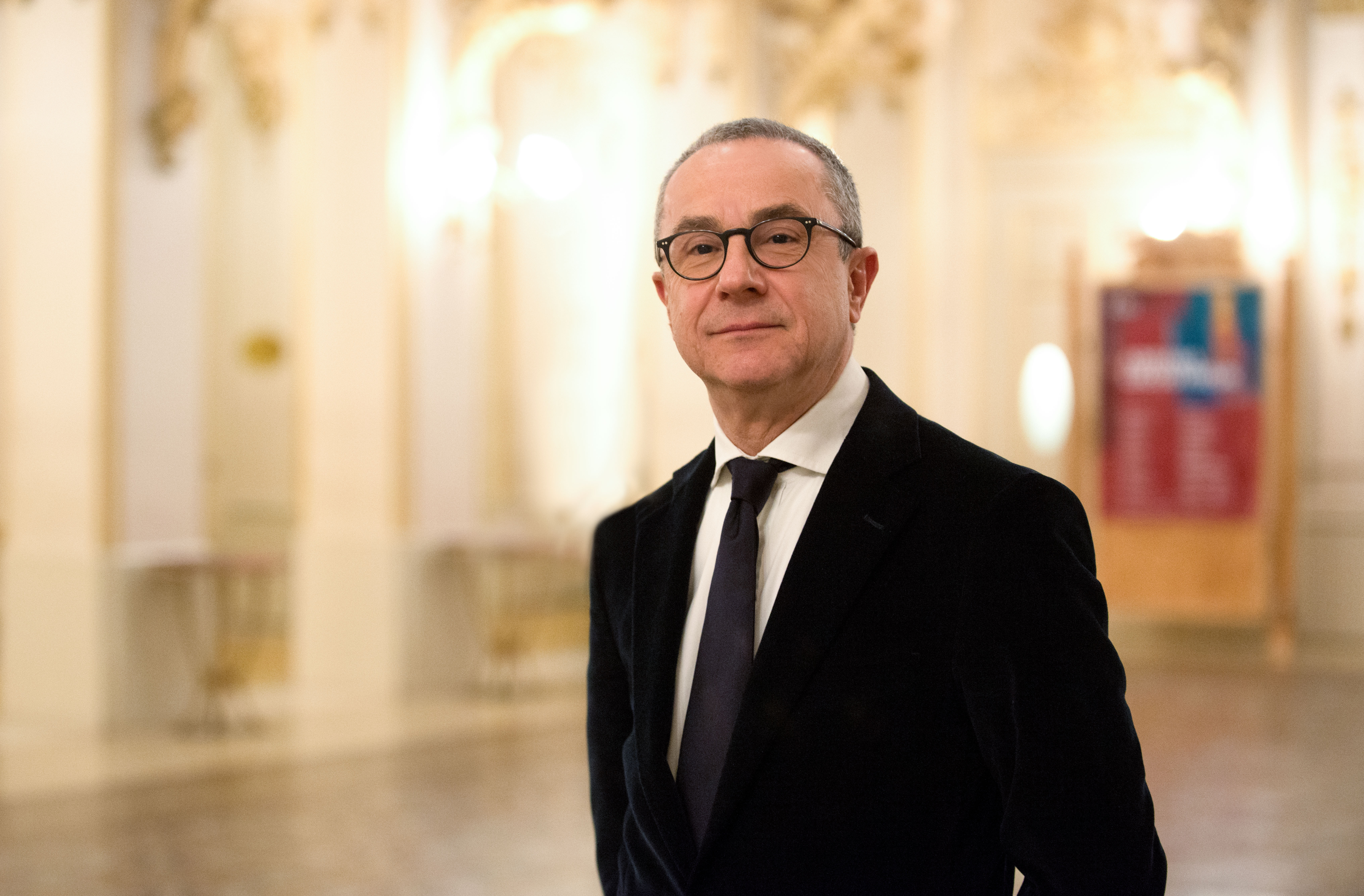 Massimo Biscardi